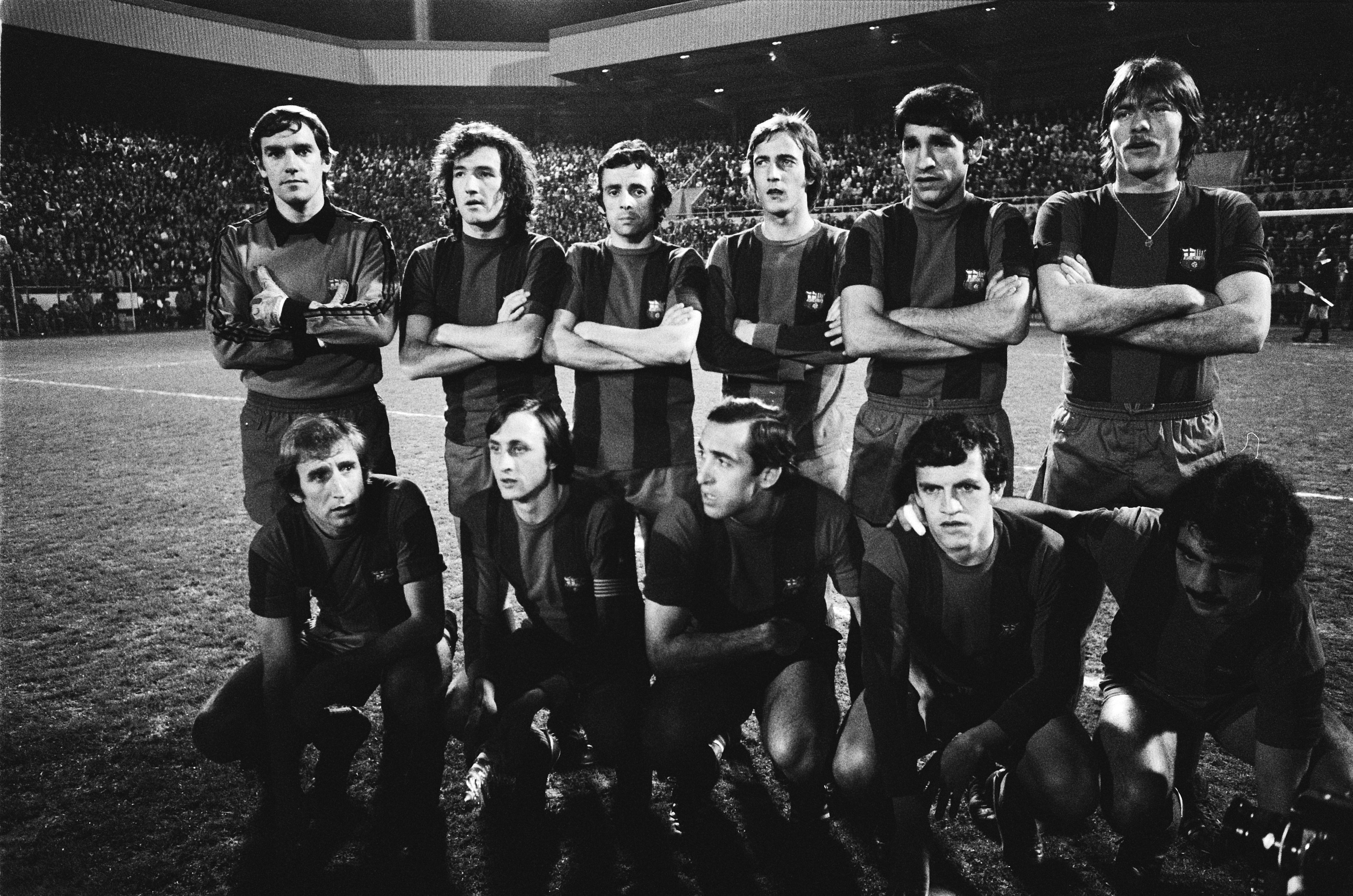 Collectie / Archief : Fotocollectie Anefo Reportage / Serie : [ onbekend ] Beschrijving : Halve finale Uefa-cup PSV tegen Barcelona 3-0, elftal Barcelona Datum : 29 maart 1978 Locatie : Barcelona Trefwoorden : sport, voetbal Instellingsnaam : FC Barcelona Fotograaf : Verhoeff, Bert / Anefo Auteursrechthebbende : Nationaal Archief Materiaalsoort : Negatief (zwart/wit) Nummer archiefinventaris : bekijk toegang 2.24.01.05 Bestanddeelnummer : 929-6484